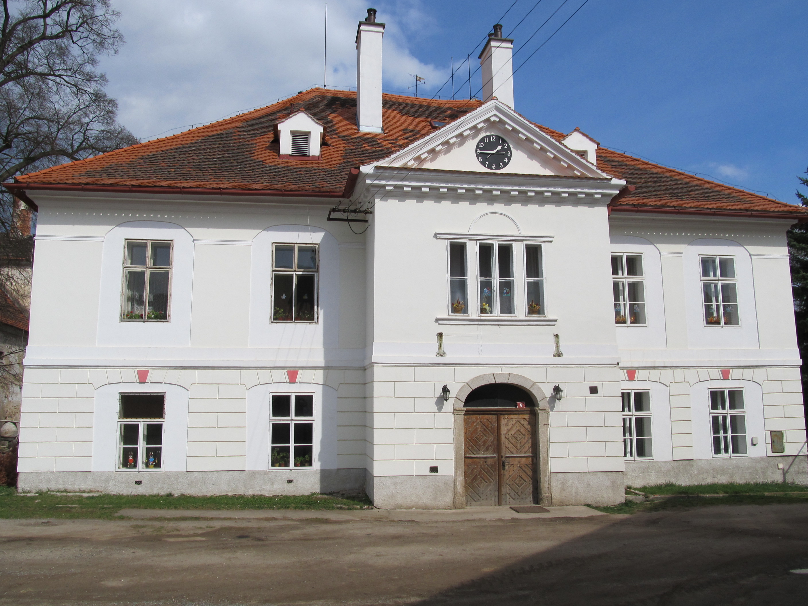 Čeminy - zámek